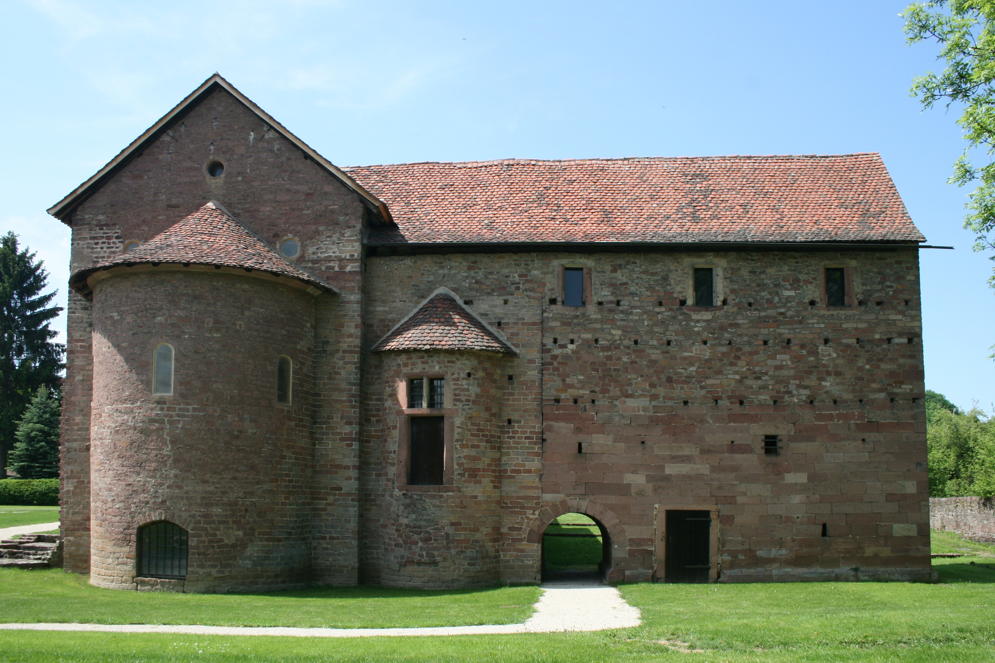 Einhardsbasilika in Michelstadt-Steinbach, Odenwald. Ansicht von Osten 2012.